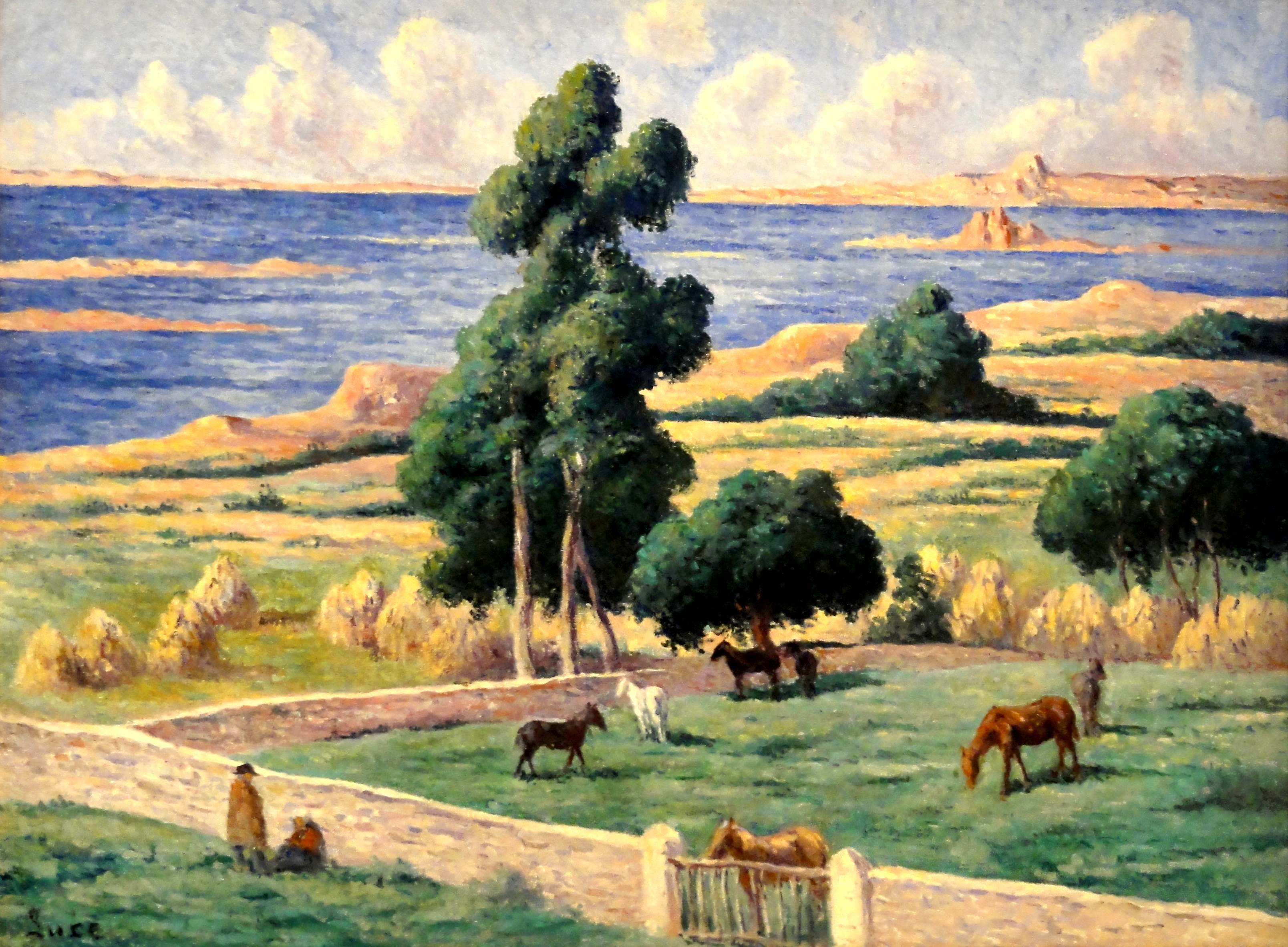 Maximilien LUCE, L'île à bois, Kermouster, Lézardrieux, 1914, Giverny, musée des impressionistes, MDIG 2011.1.2.